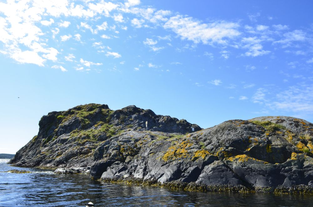 Låven sett fra nord mot sør.